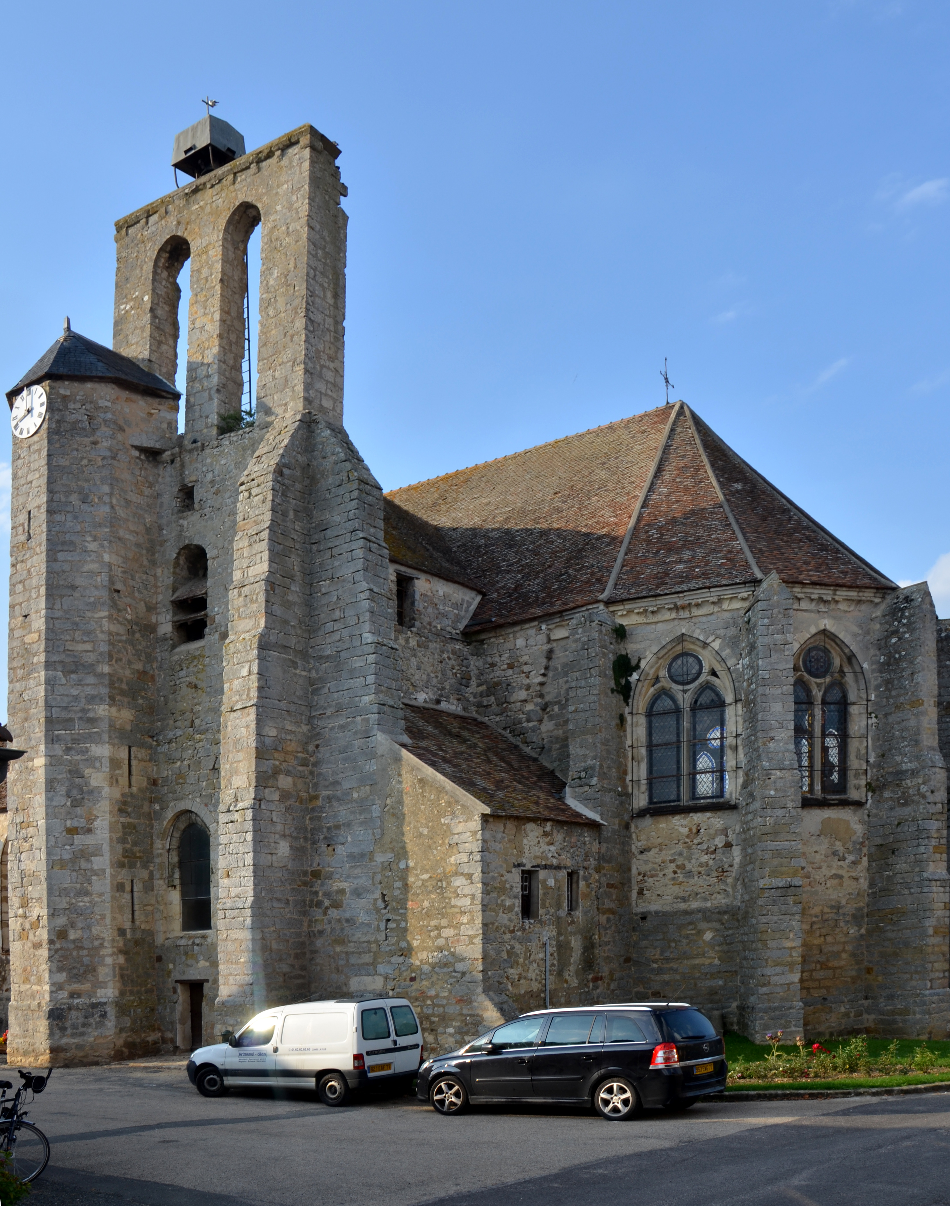 Eglise de Flagy, Seine et Marne, France